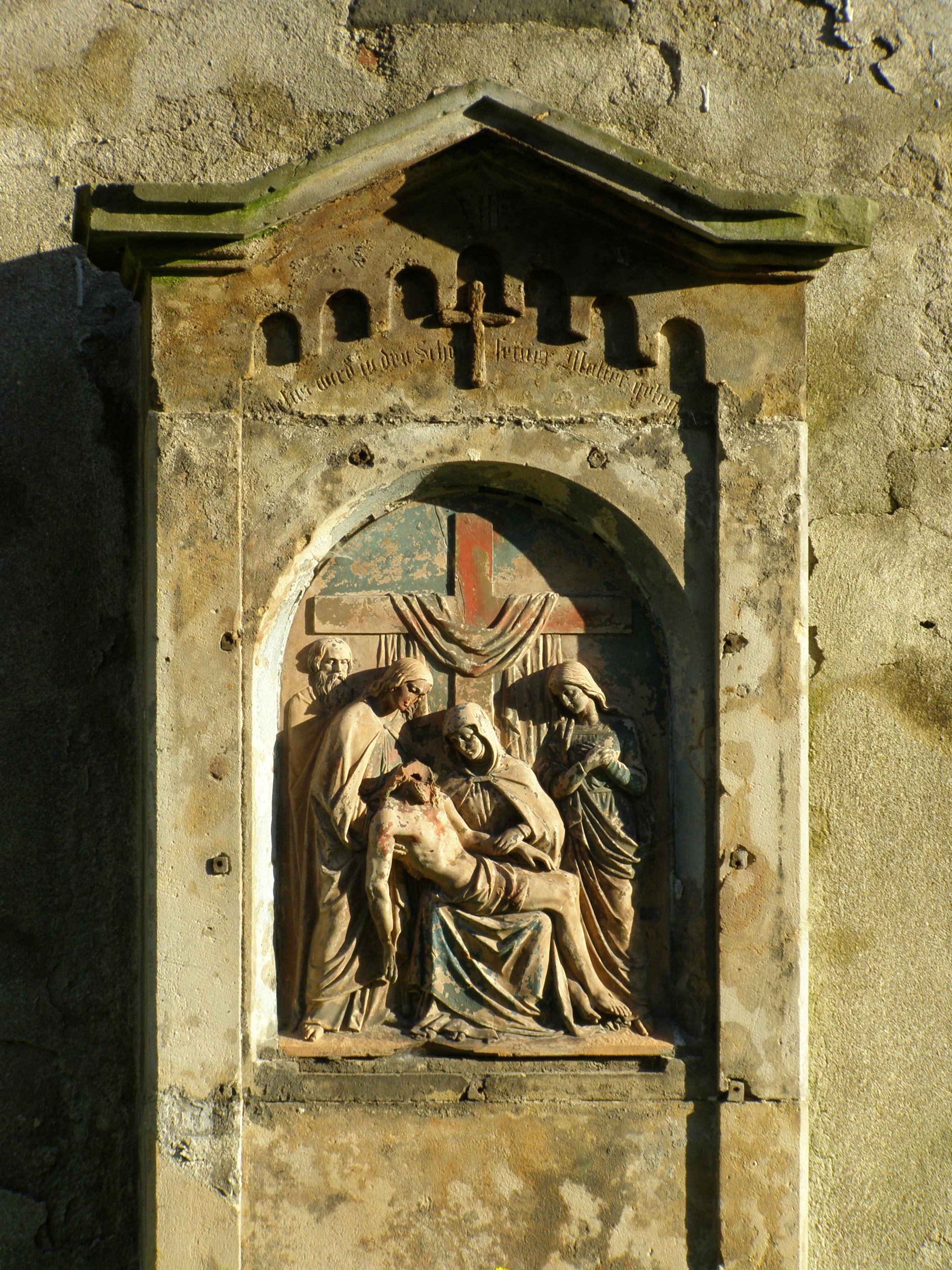 Frýdlant, ulice Děkanská, křížová cesta